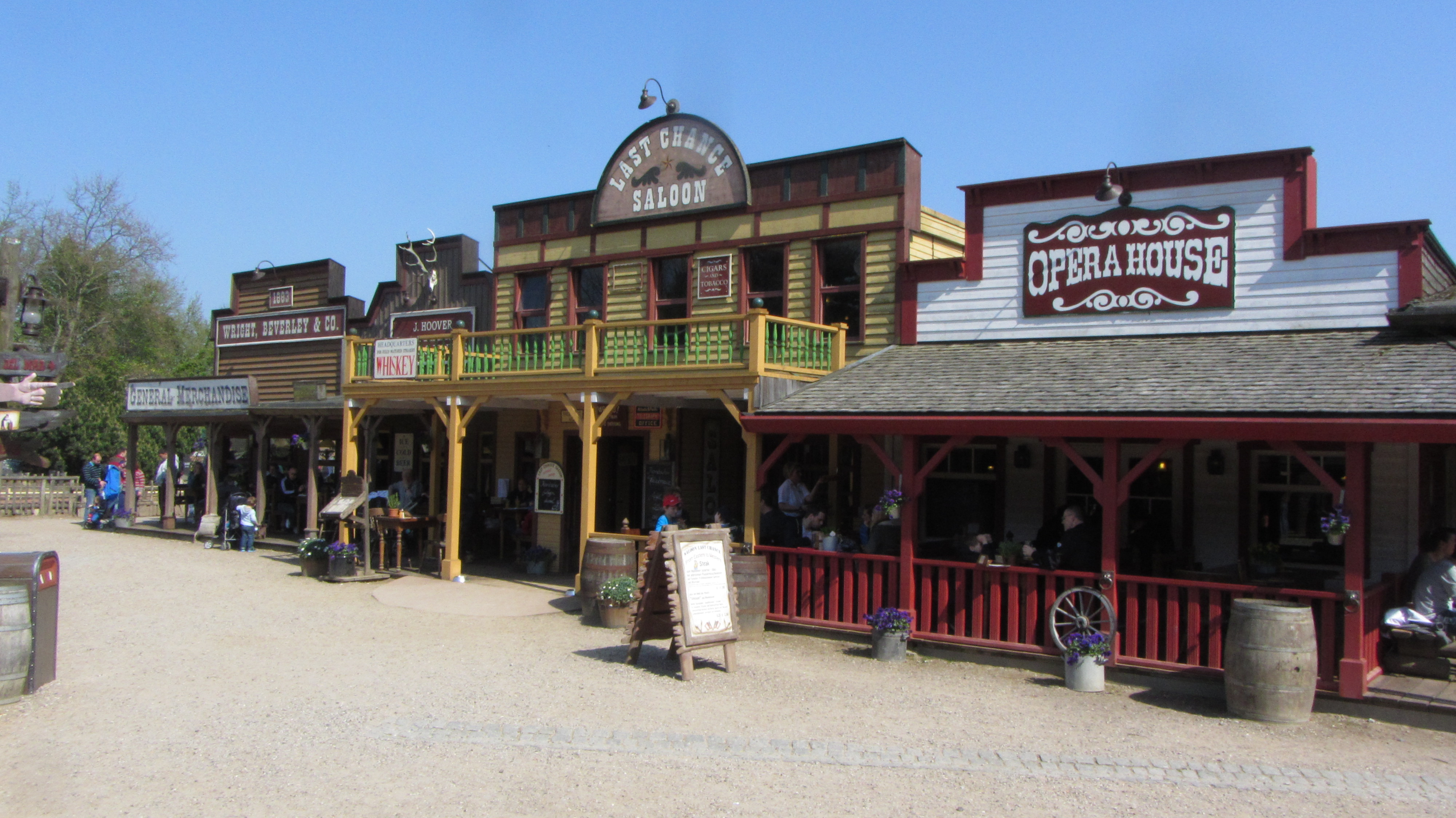 Front mehrere Geschäfte in der Themenwelt "Bonanza City" im Hansa-Park